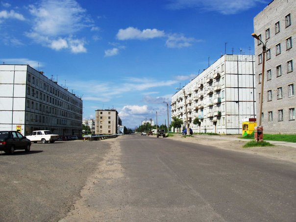 27 км